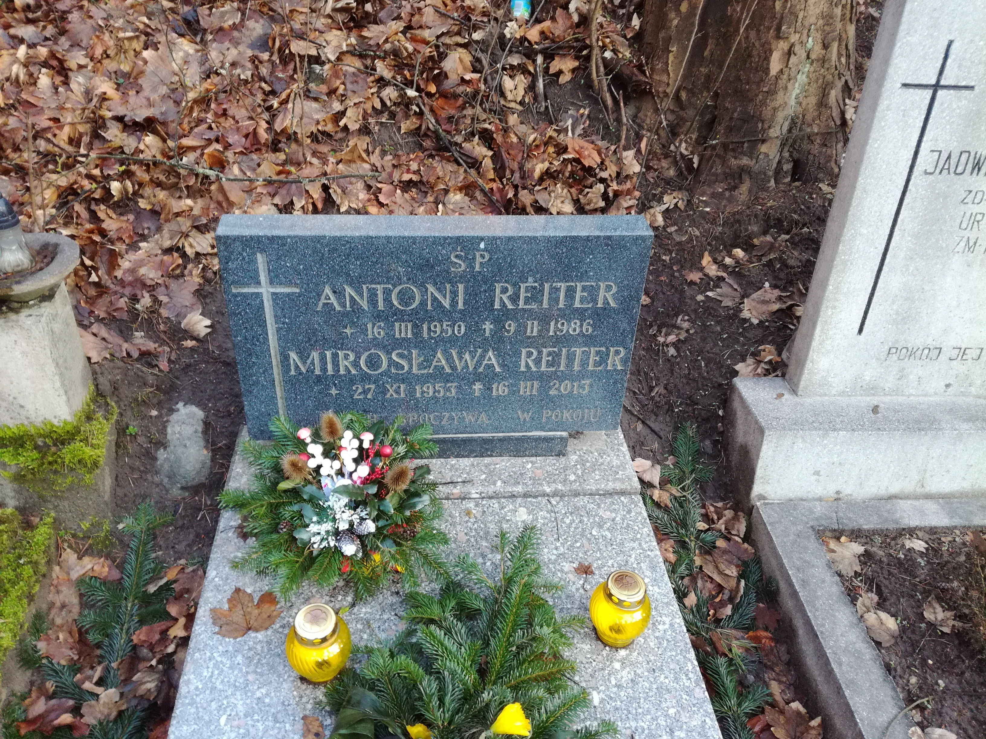 grób judoki Antoniego Reitera na Cmentarzu Srebrzysko w Gdańsku.